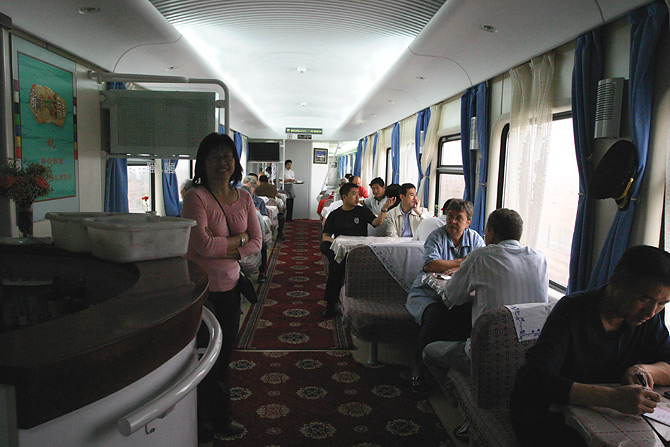 Qingzang railway dining car 青藏鐵路餐車